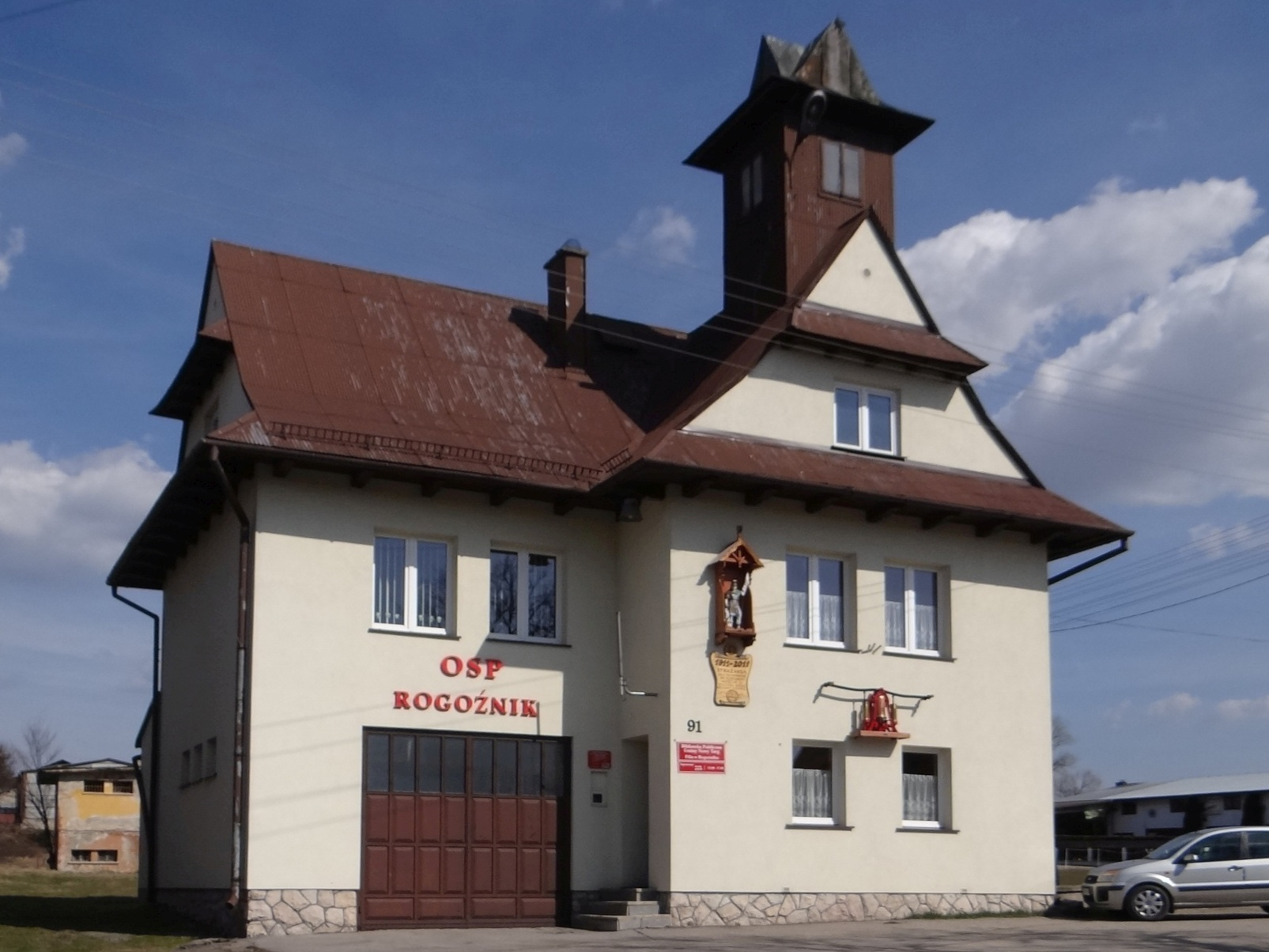 Rogoźnik